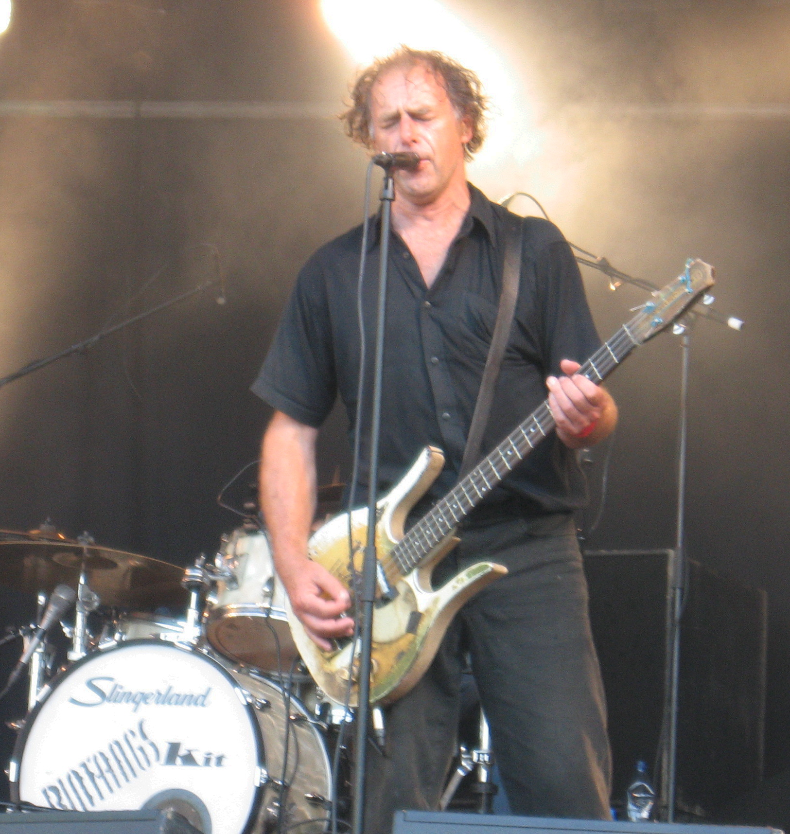 Frank_Kraaijeveld, Bintangs, Westerpop Danelectro Longhorn Bass